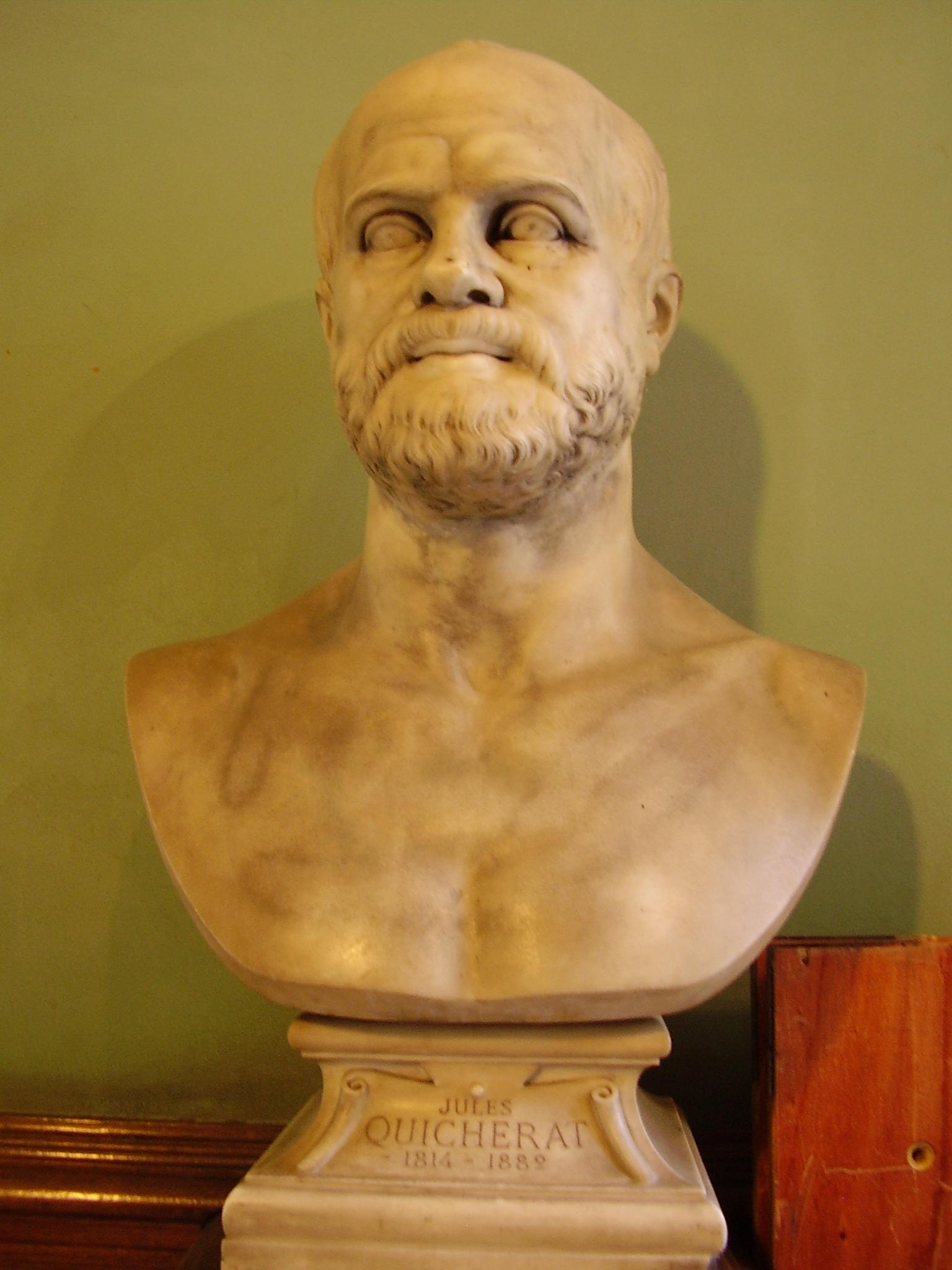 Auteur : Rémi Mathis (photo personnelle)